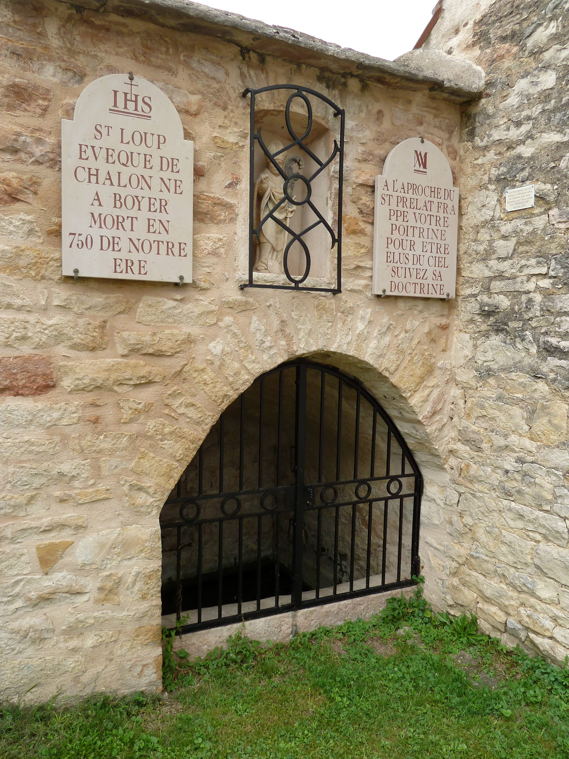 Fontaine St Loup, Boyer (71)